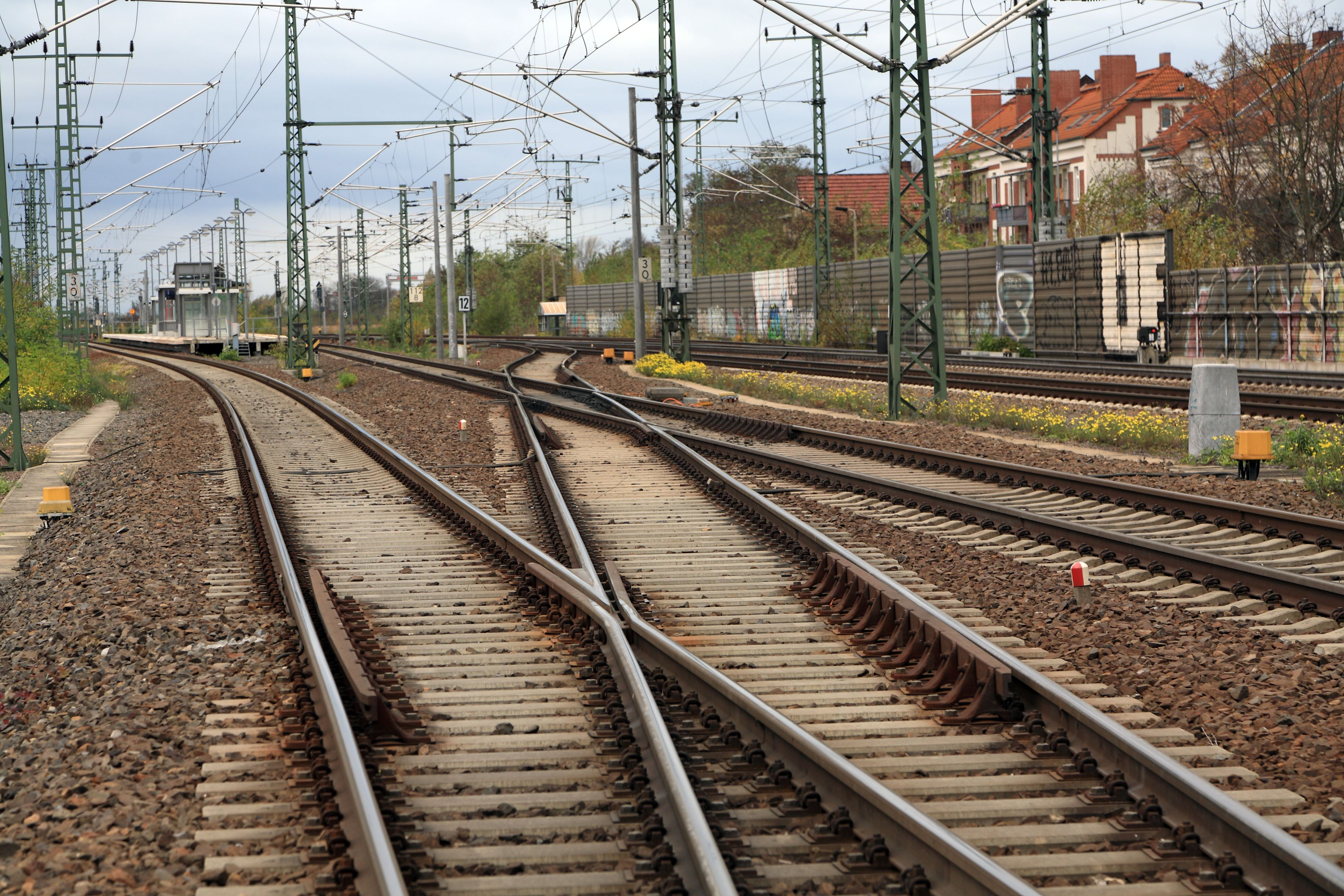 Richtung Westen, die Gleise von rechts unten sind die der S-Bahn-Strecke 6382 In Richtung Bahnsteig, das sie nach rechts kreuzende Gleis die in den Klv-Bahnhof eingebundene Strecke 6380 von Leutzsch.